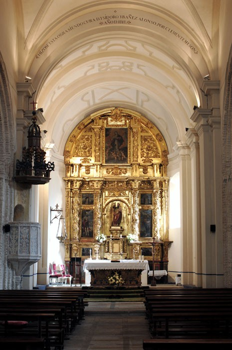 Nave y altar de San Andrés de Cuéllar